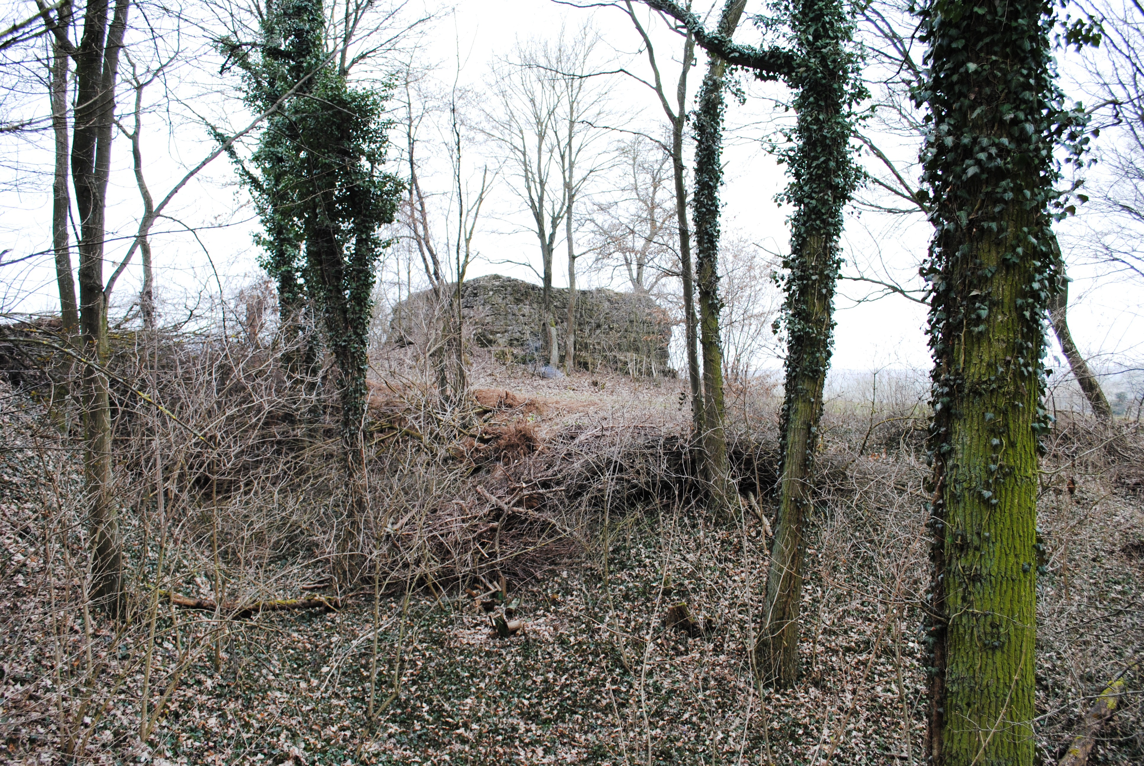 Stettenburg, Grabenreste, Volkach-Obervolkach